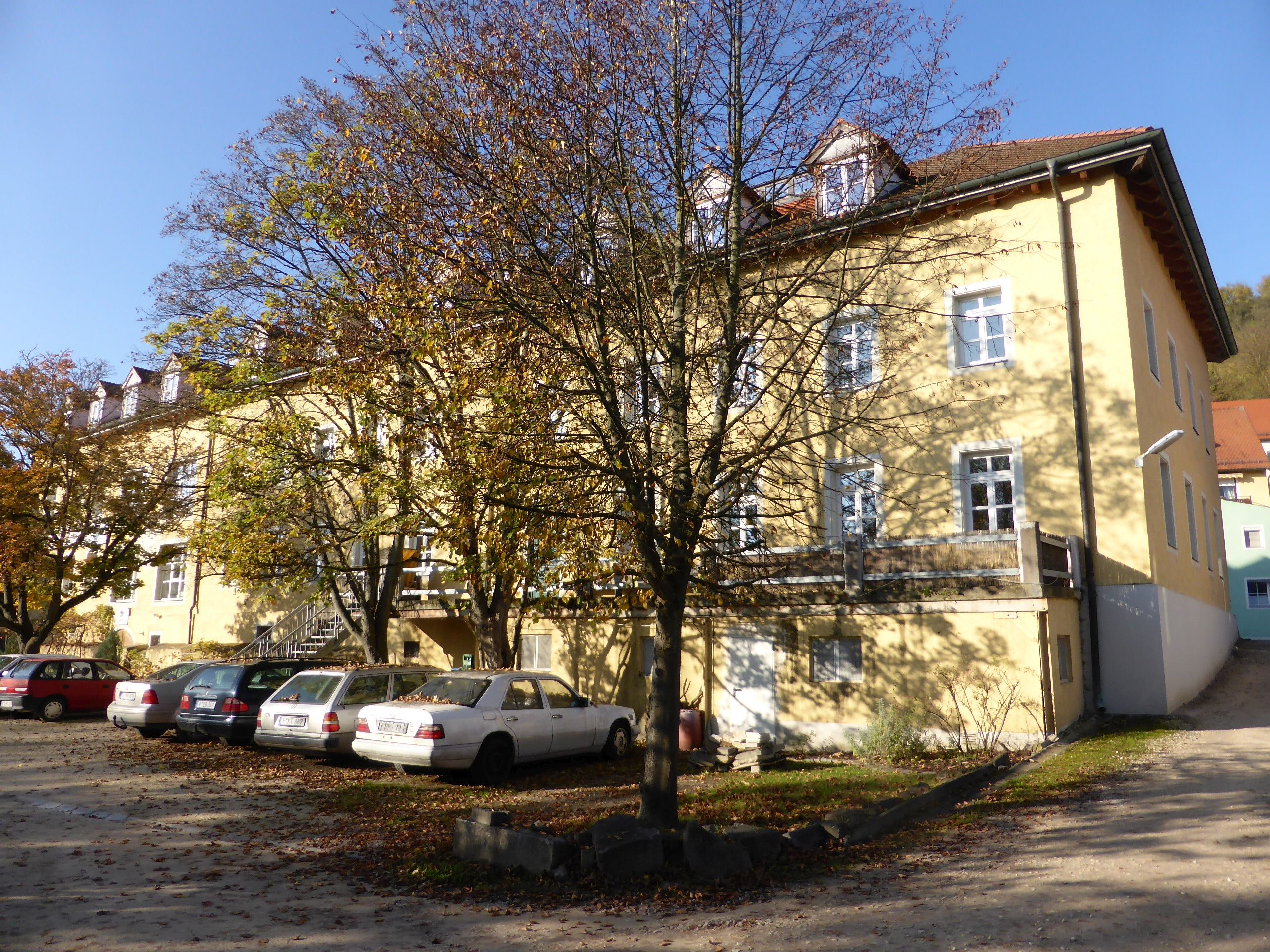 Nürnberger_Straße_249_Regensburg